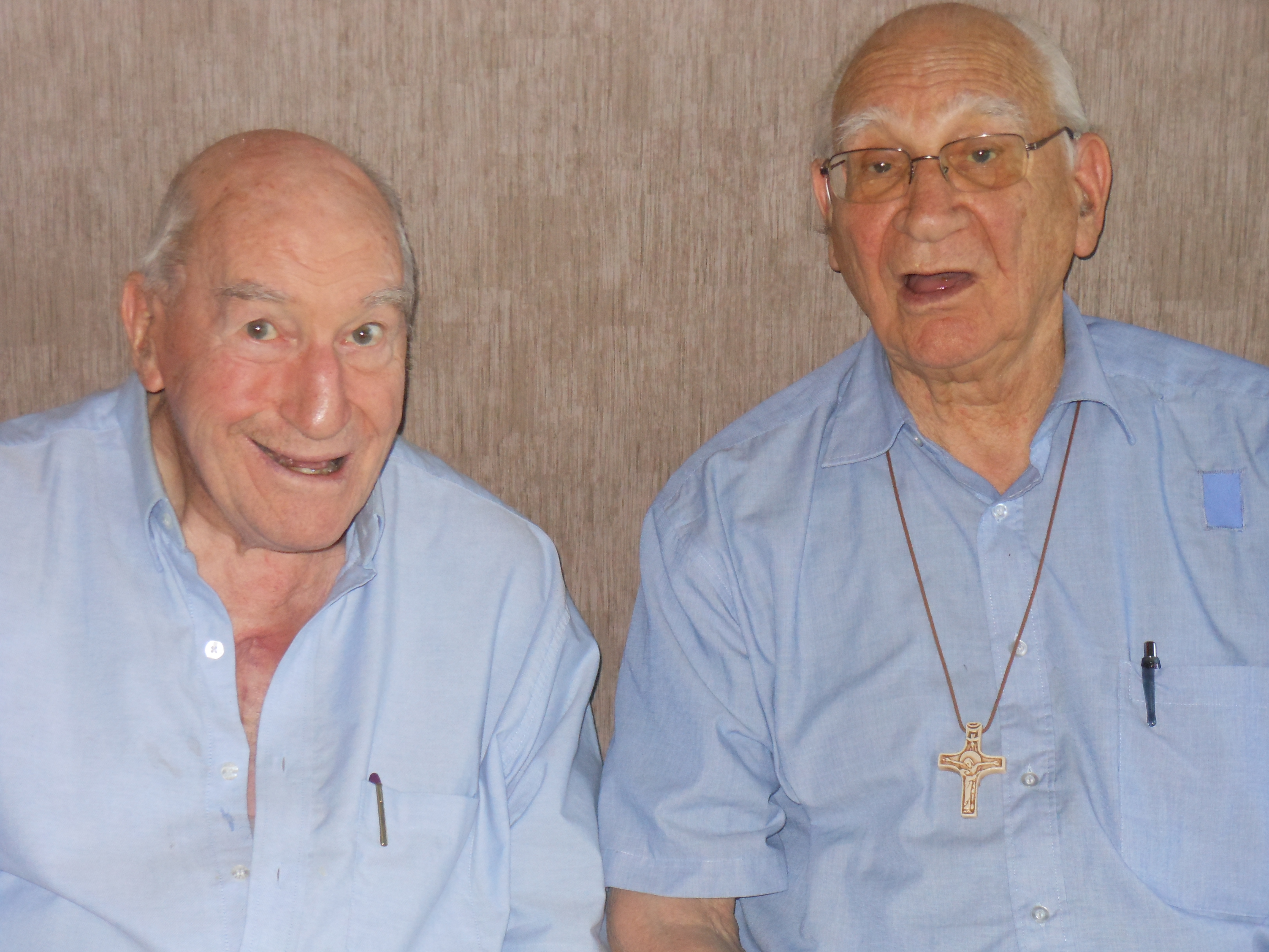 Les Frères Jaccard en mission